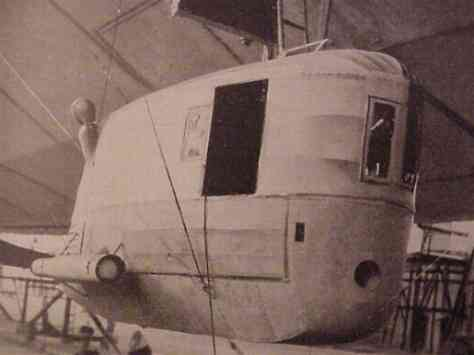 L 30's højre gondol